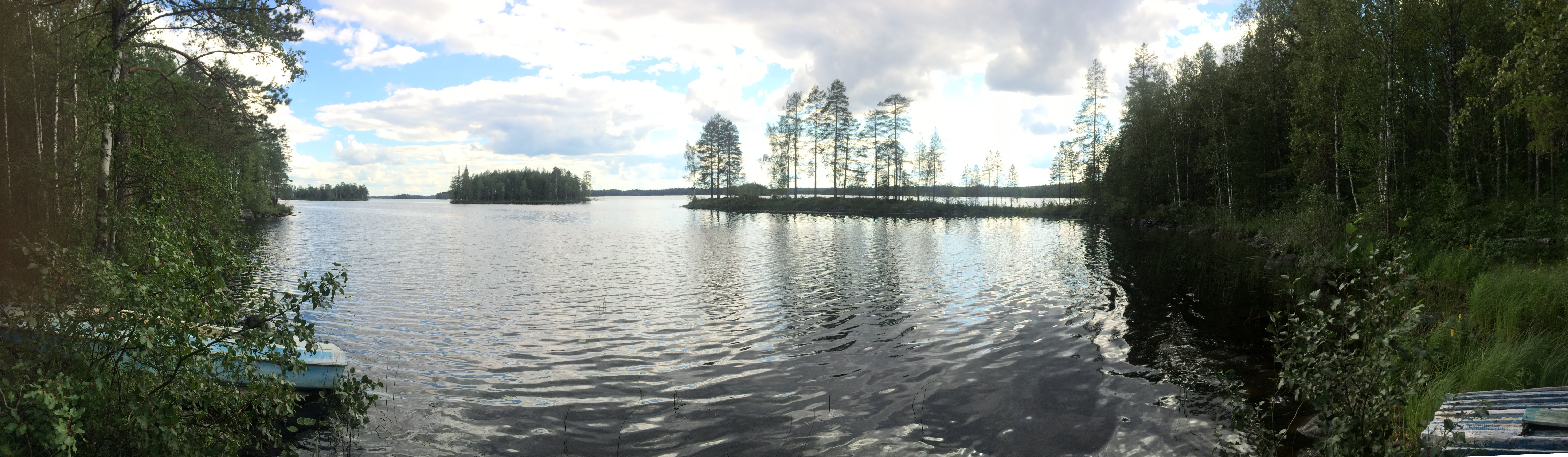 Музозеро